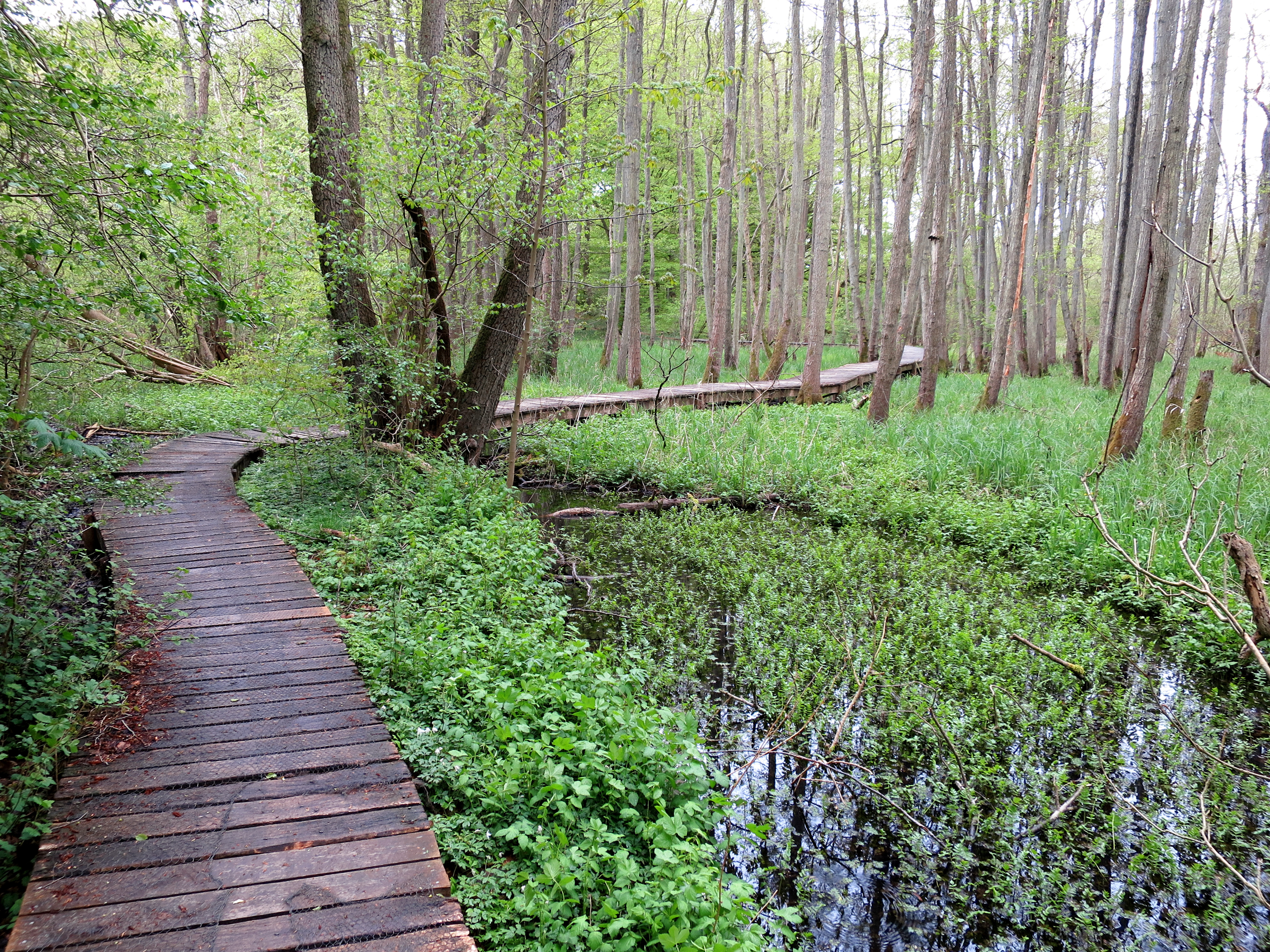 Broen over Ellesumpen i Moesgård Skov. En del af Oldtidsstien.